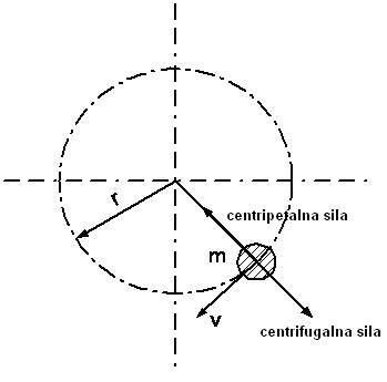 Centrifugalna sila2